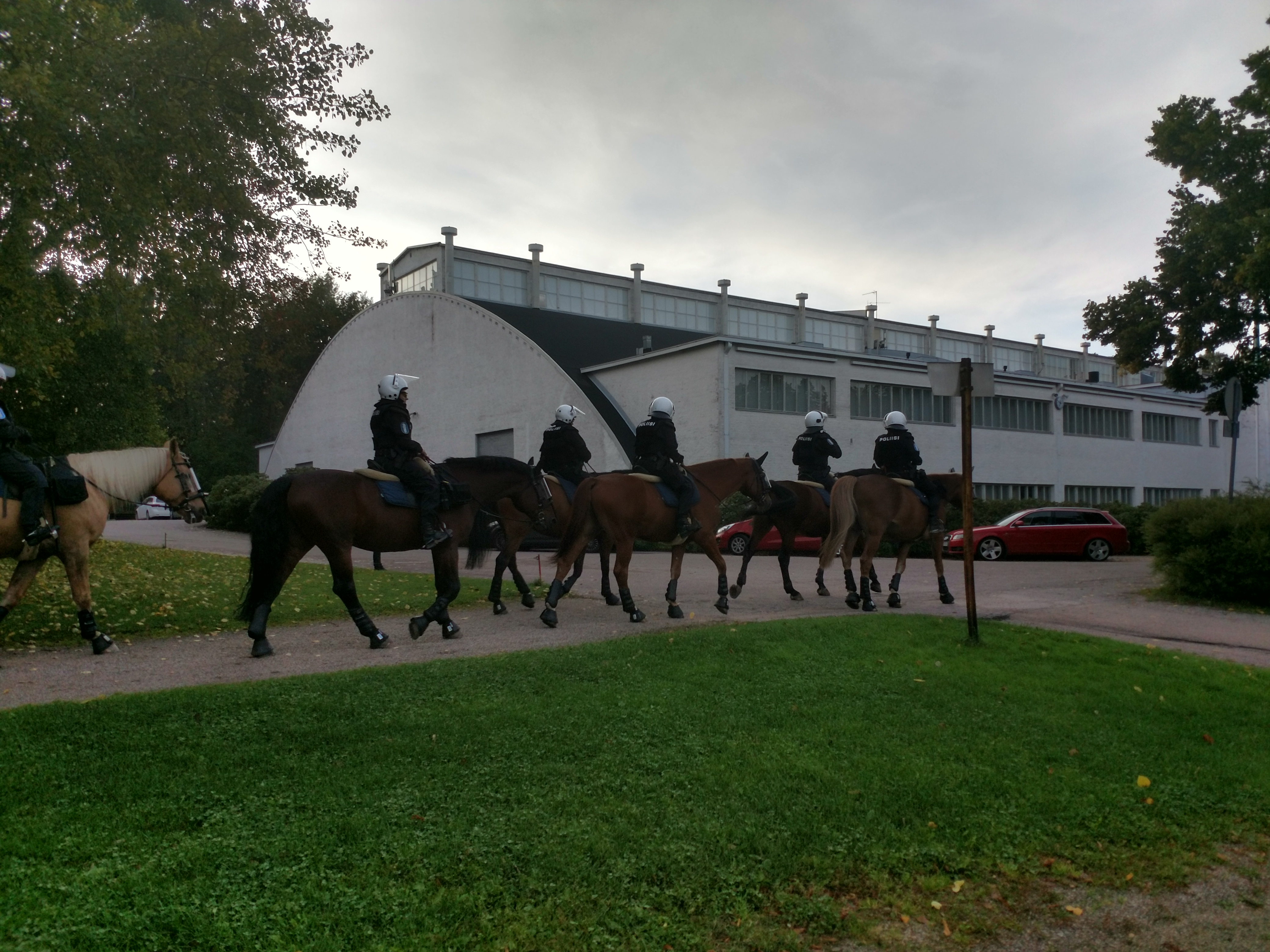 Ruskeasuon ratsastushalli